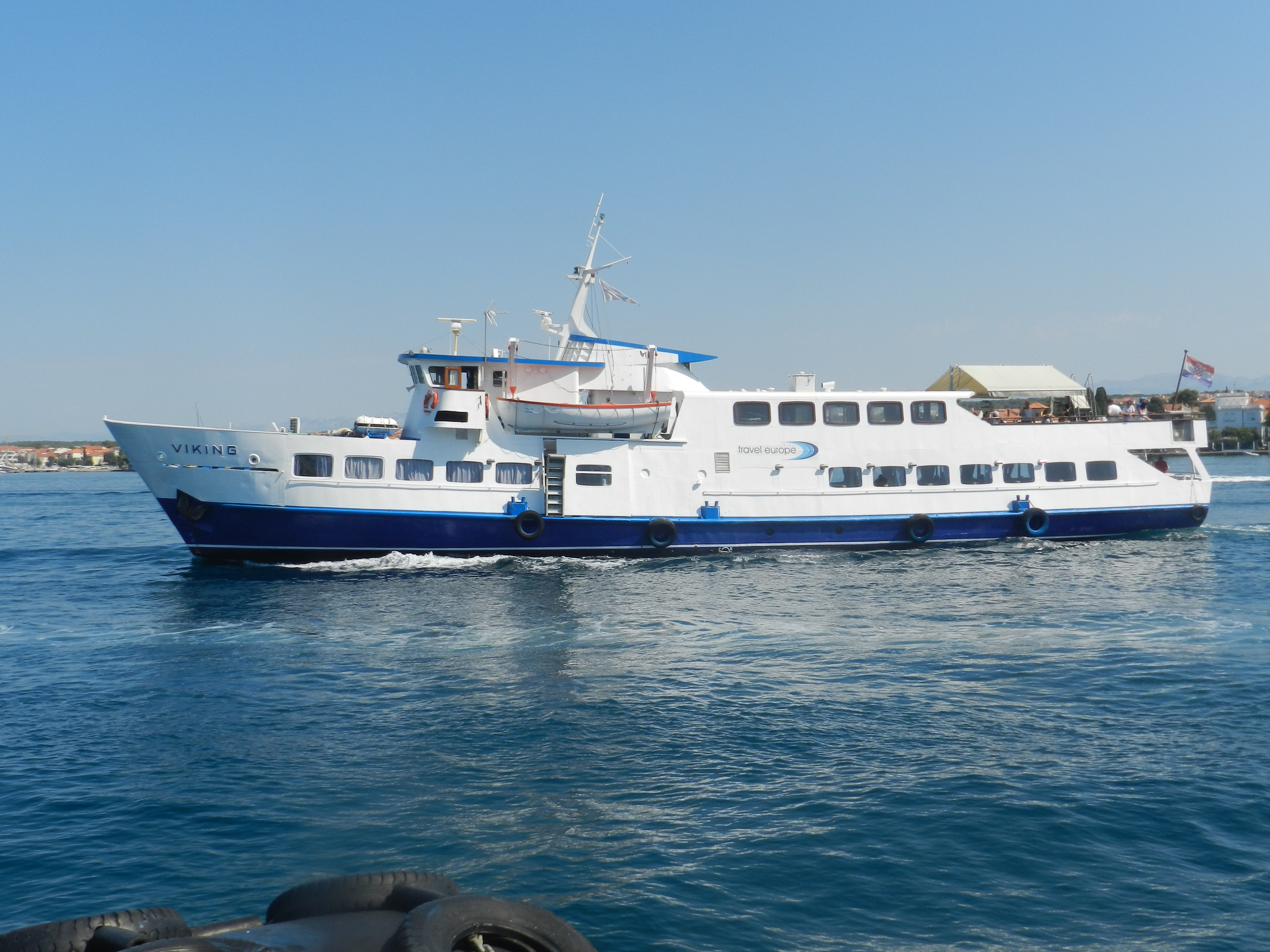 MS Viking auslaufend Zadar